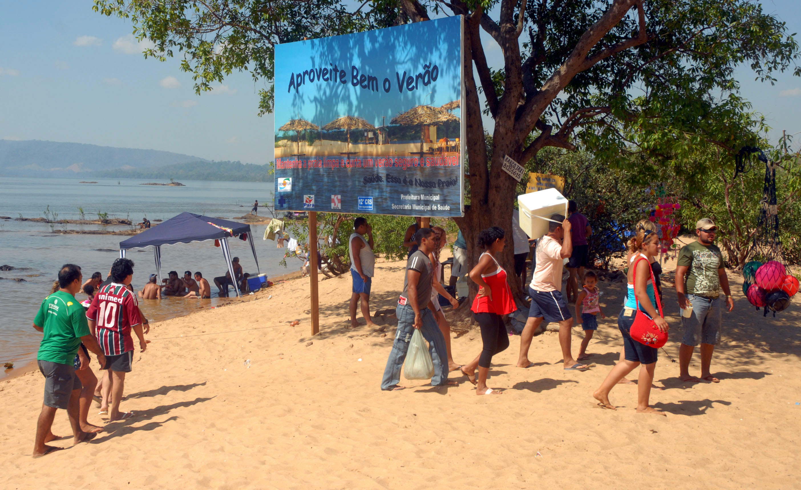 São Félix do Xingu (Pará) - Praias do Rio Xingu onde a população e habitantes de cidades vizinhas aproveitam os dias para tomar banho, pescar e acampar com a família